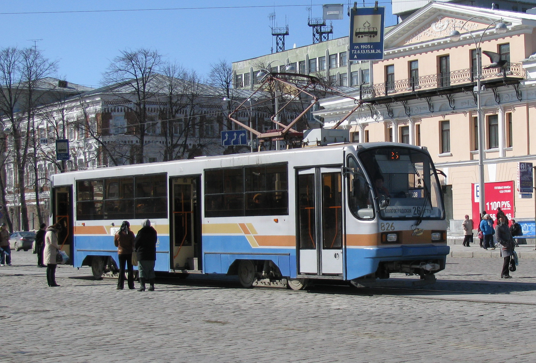 Трамвай модели 71-405 производства завода "Уралтрансмаш" (Екатеринбург) в Екатеринбурге.